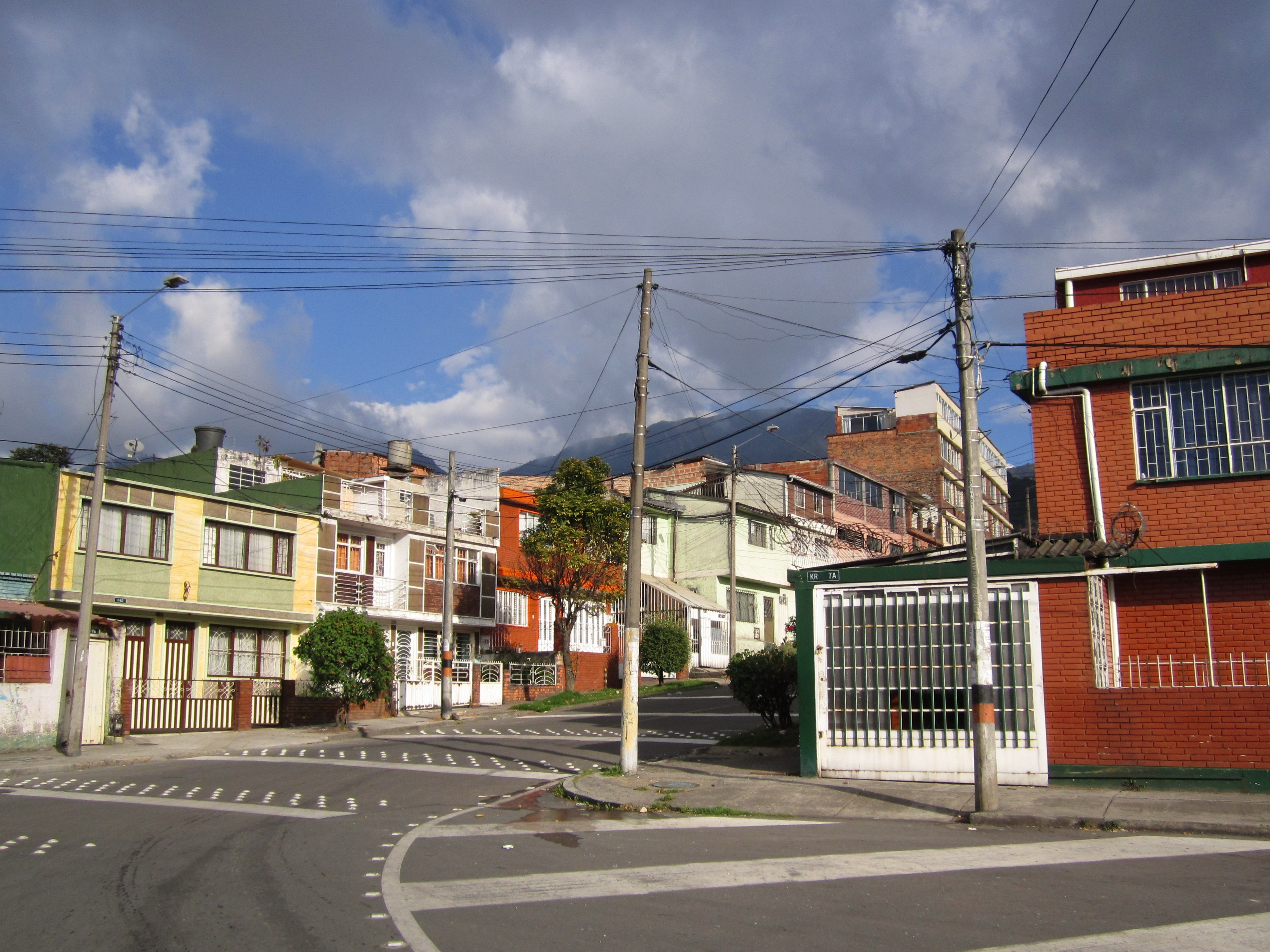 Barrio Calvo Sur, carrera 7 A con calle 1 A Sur, localidad de Antonio Nariño en Bogotá.